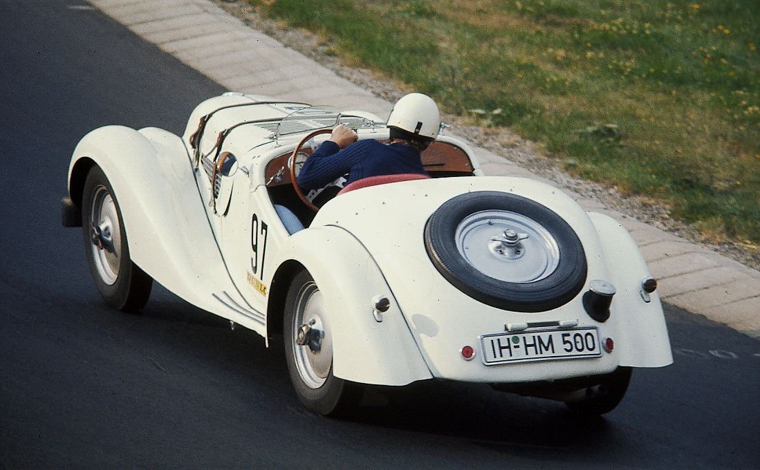 BMW 328, Baujahr 1938, gefahren von Uli Sauer in der Südkehre des Nürburgrings beim AvD-Oldtimer-Grand-Prix